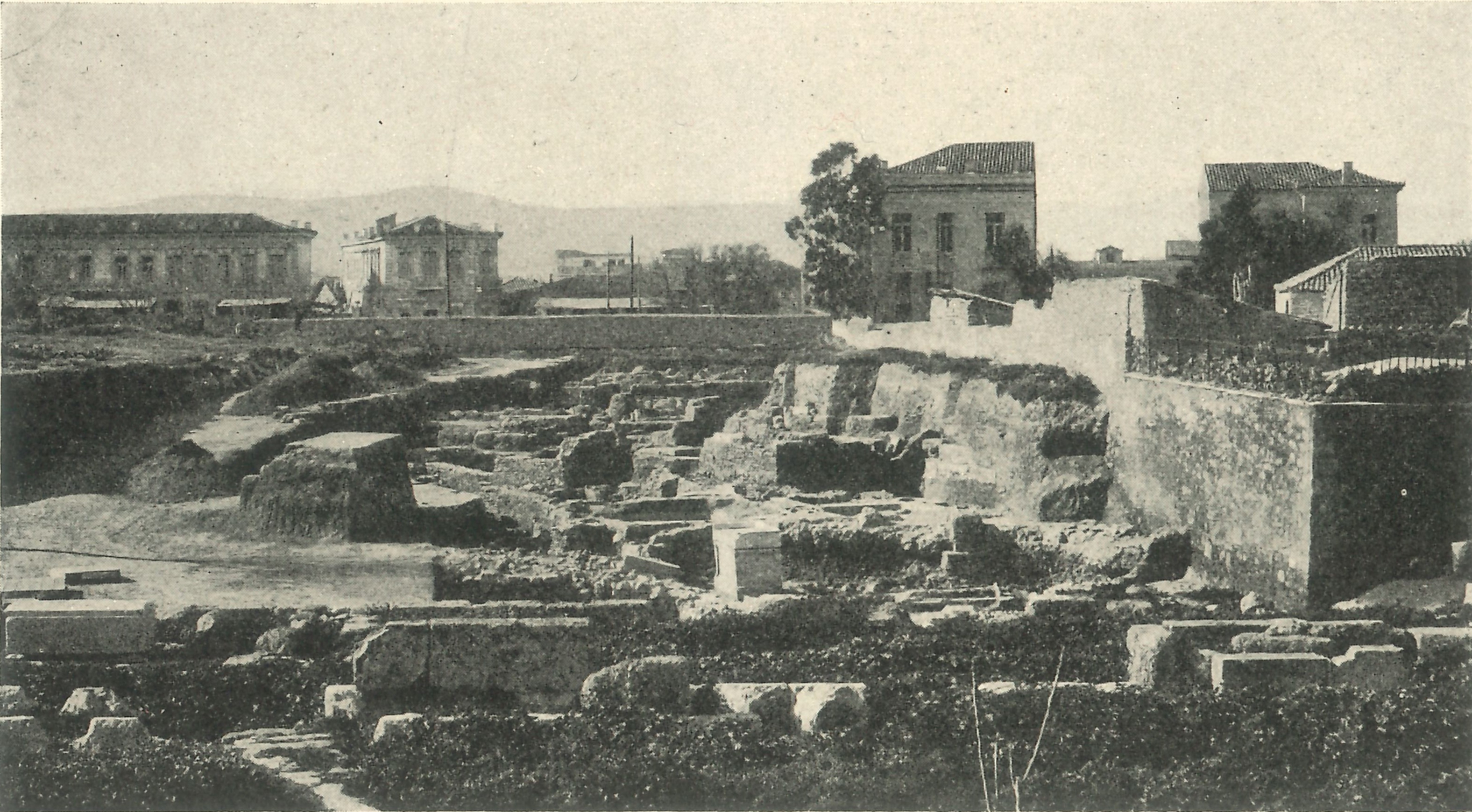 Ausgrabungen auf dem Bereich der Kerameikosstraße durch das Deutsche Archäologische Institut 1914/1915. Blick vom Dipylon-Tor in Richtung der Piräus-Straße.